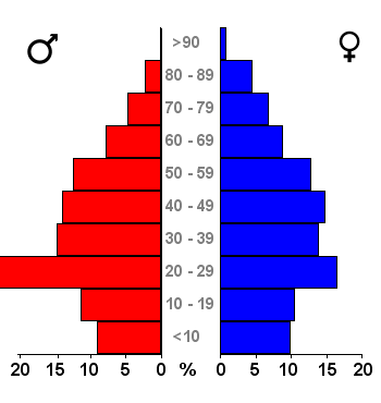 Age pyramids for the 443 municipalities in the Netherlands. Data 2007. Statistics provided by Centraal Bureau voor de Statistiek, Voorburg/Heerlen. Source: Tabel: Bevolking Nederland per gemeente en diverse regio's naar leeftijd, geslacht en burgerlijke staat, 1 januari 1988-2007. Gewijzigd op 24 mei 2007 (on-line database StatLine) Bevolkingspiramide - Gemeente Delft (2007).png